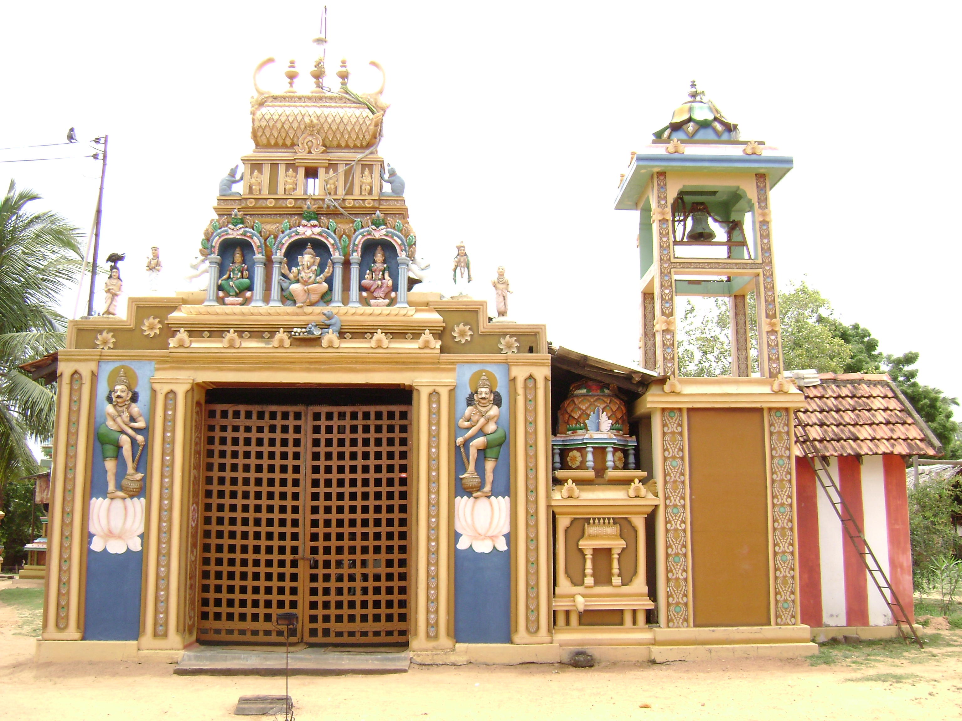 திருகோணமலை மனையாவளிப்பகுதியில் உள்ள வல்லவ சக்தி பிள்ளையார் கோயில் இன் முகப்புத் தோற்றம். Template:வார்ப்புரு:GFDL